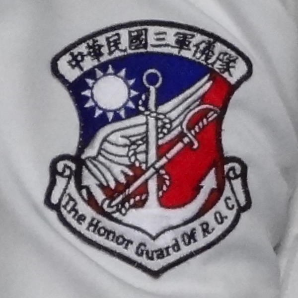 中華民國三軍儀隊臂章。